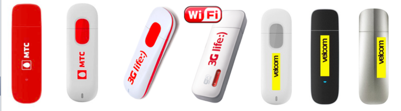 3G modems Belarus